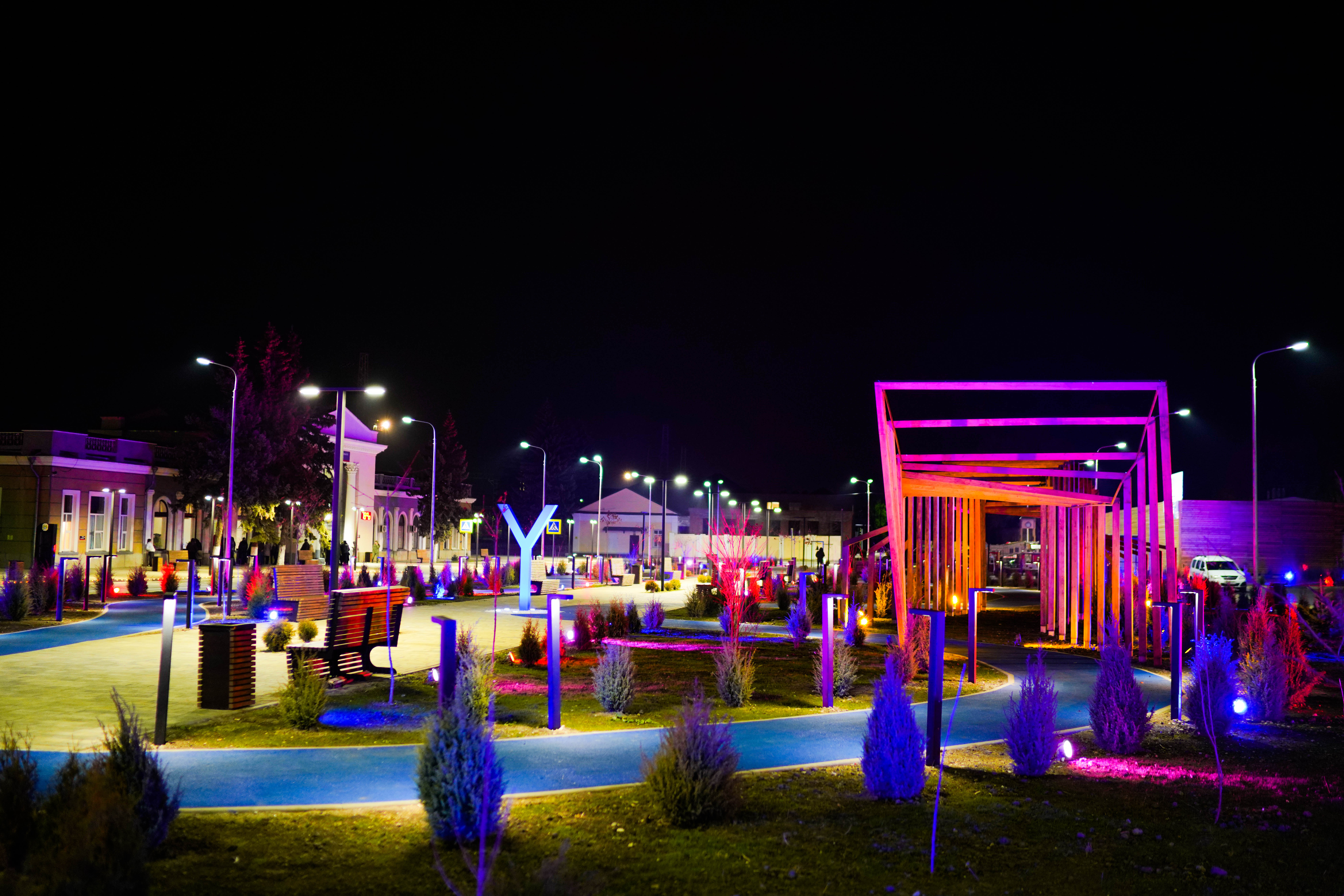 Железнодорожный вокзал в моногороде Невинномыск